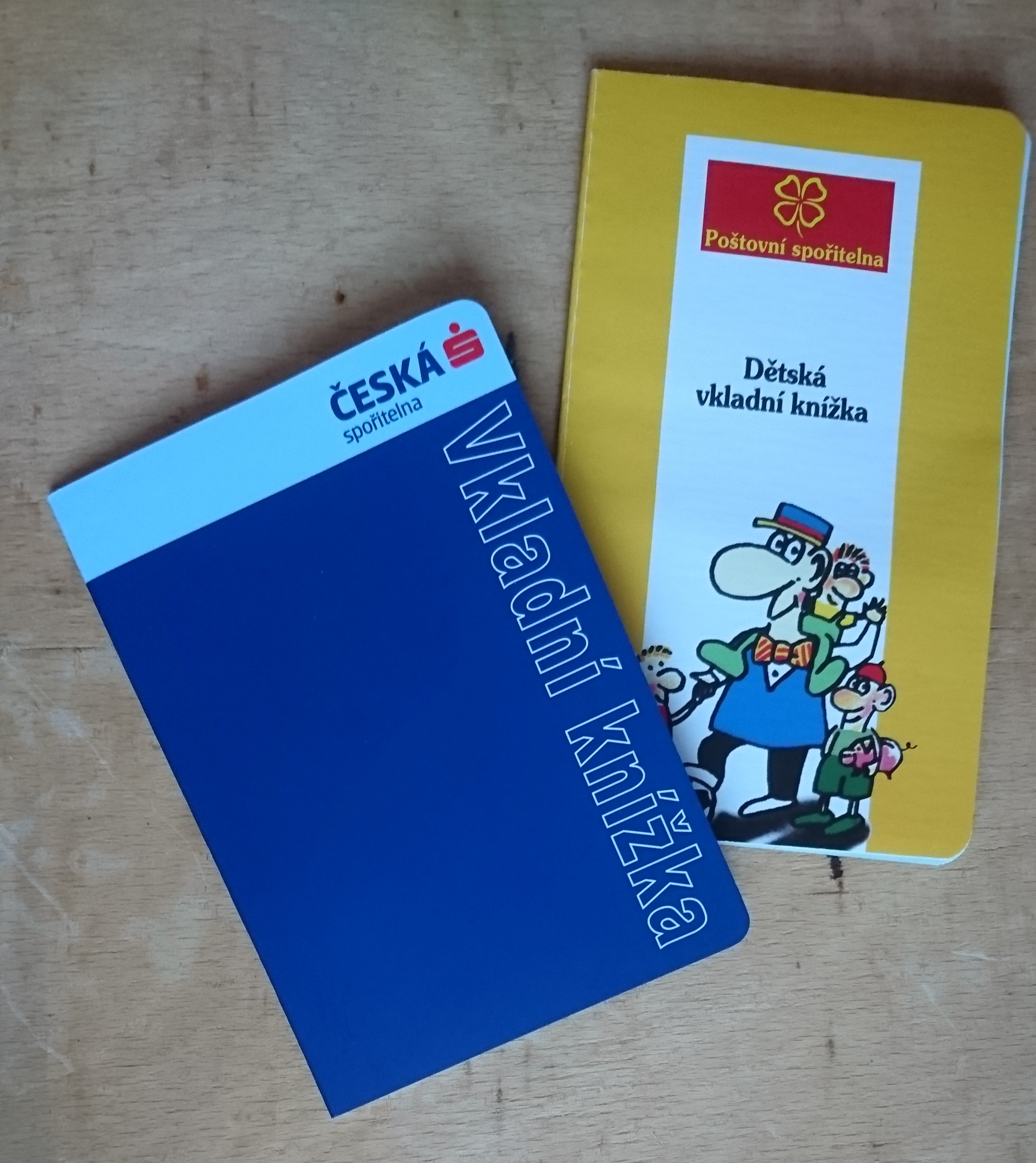 Současná podoba nabízených dětských vkladních knížek od České spořitelny (modrá) a Poštovní spořitelny (žlutočervená). Jedná se o vkladní knížky na jméno dítěte.